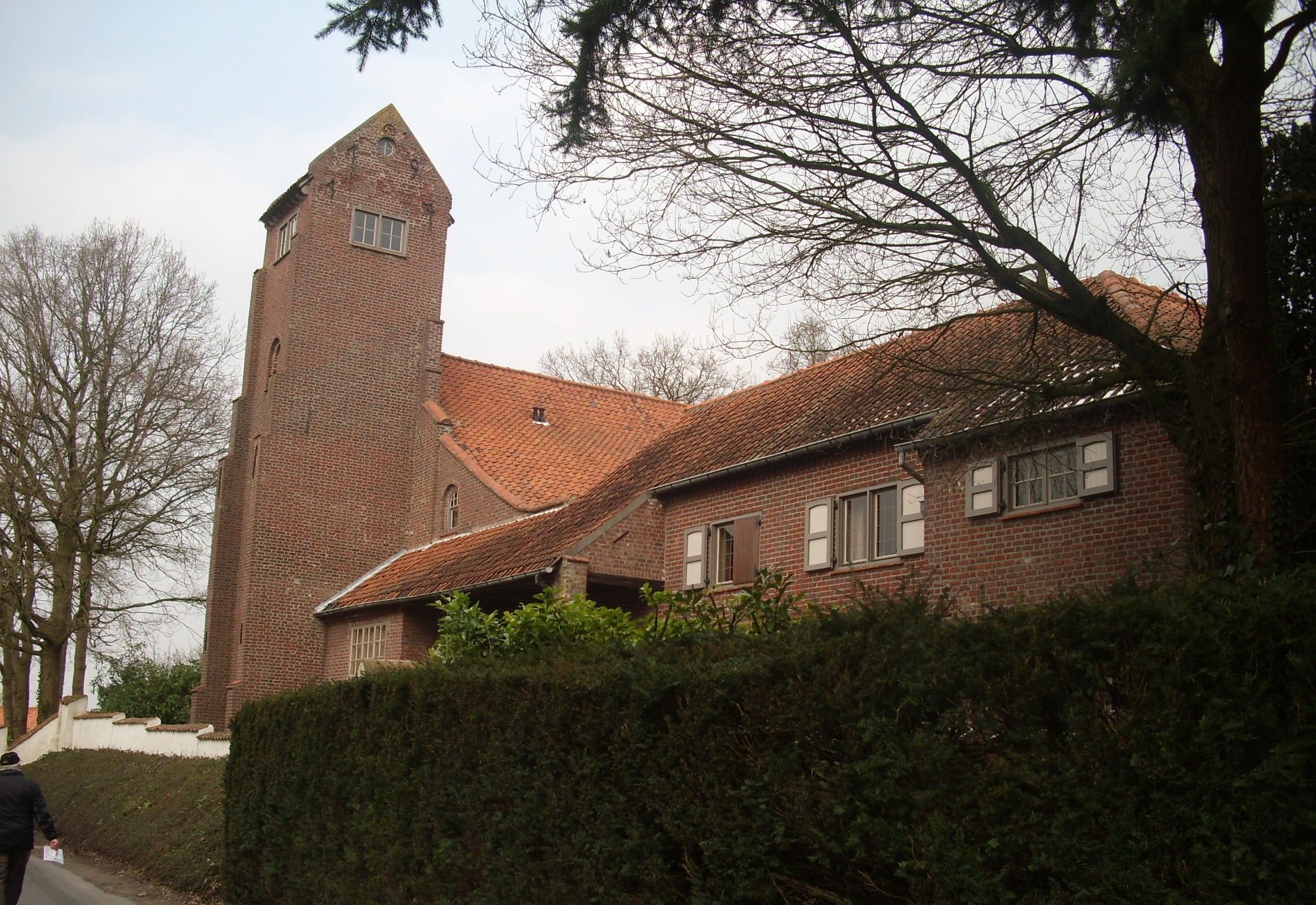 Torenhuis van Albert Servaes - gebouwd in 1917 - Baarle-Frankrijkstraat 10 - Sint-Martens-Latem - Oost-Vlaanderen - België